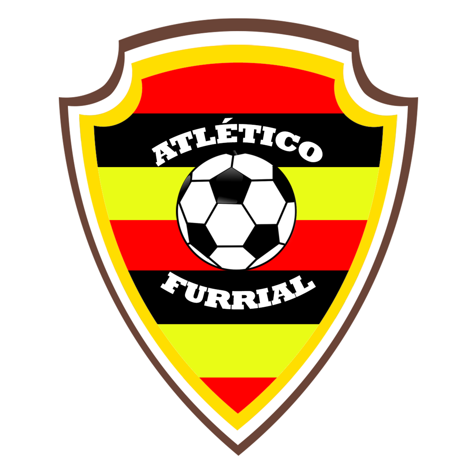 Escudo CA Furrial.